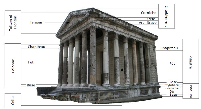 Composition architecturale du Temple d'Auguste et de Livie (avec légende détaillé).